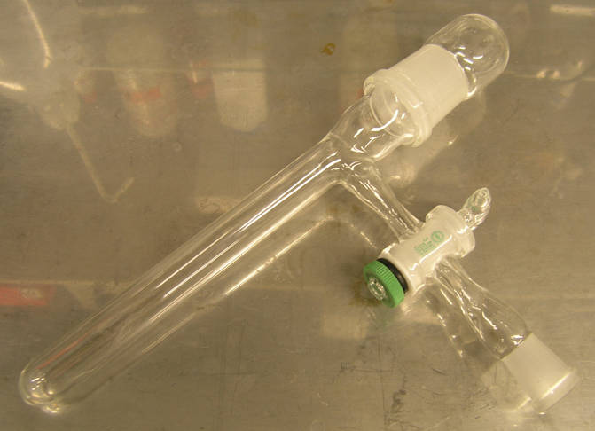 Schlenkgefäß